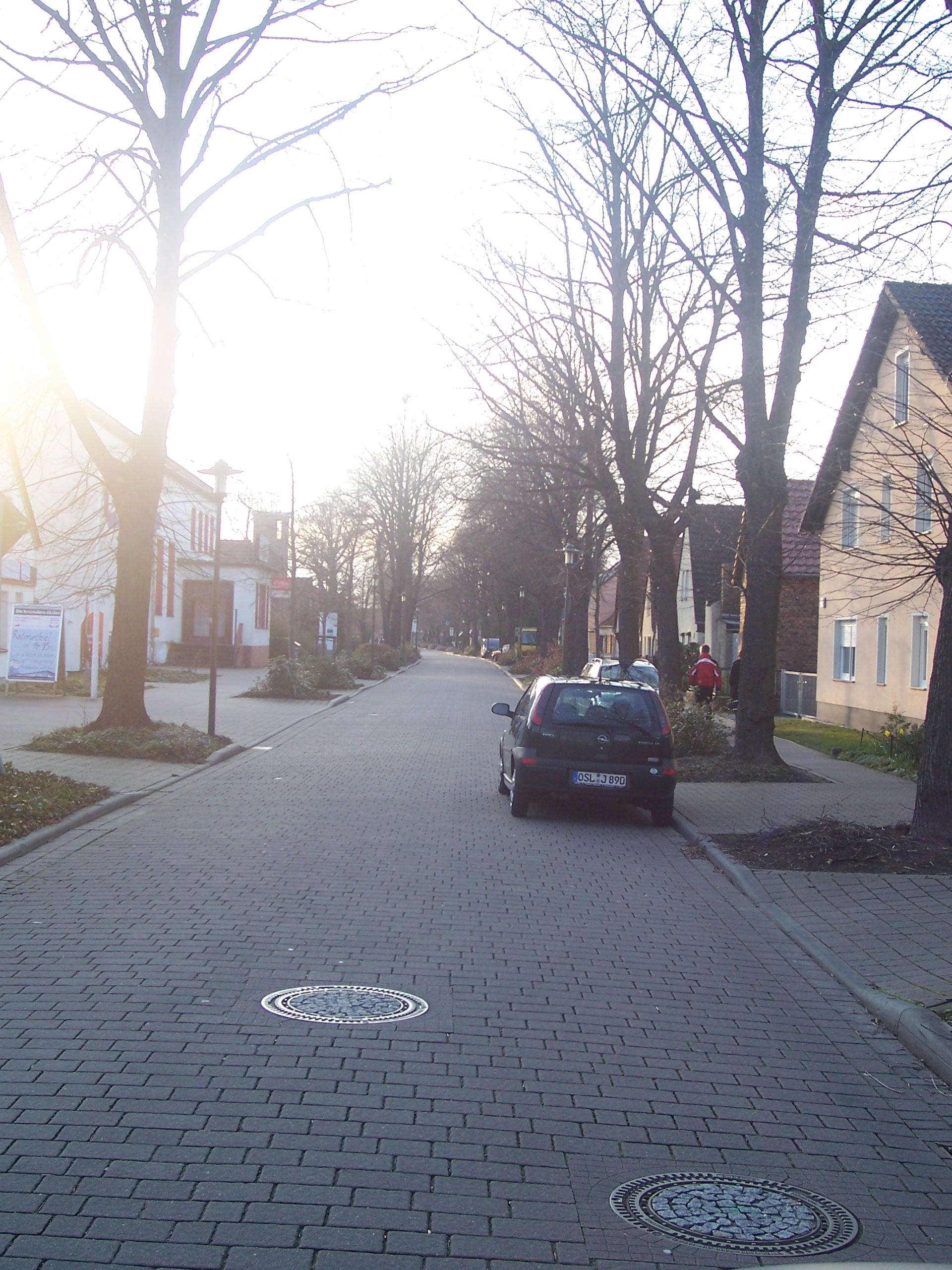 Alter Ortskern des Senftenberger Stadtteils Buchwalde.